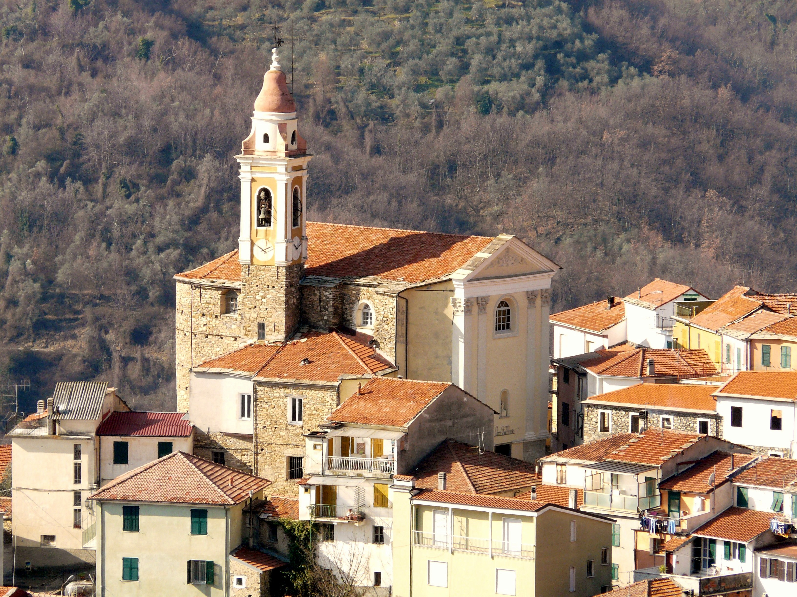 Aurigo, Liguria, Italia